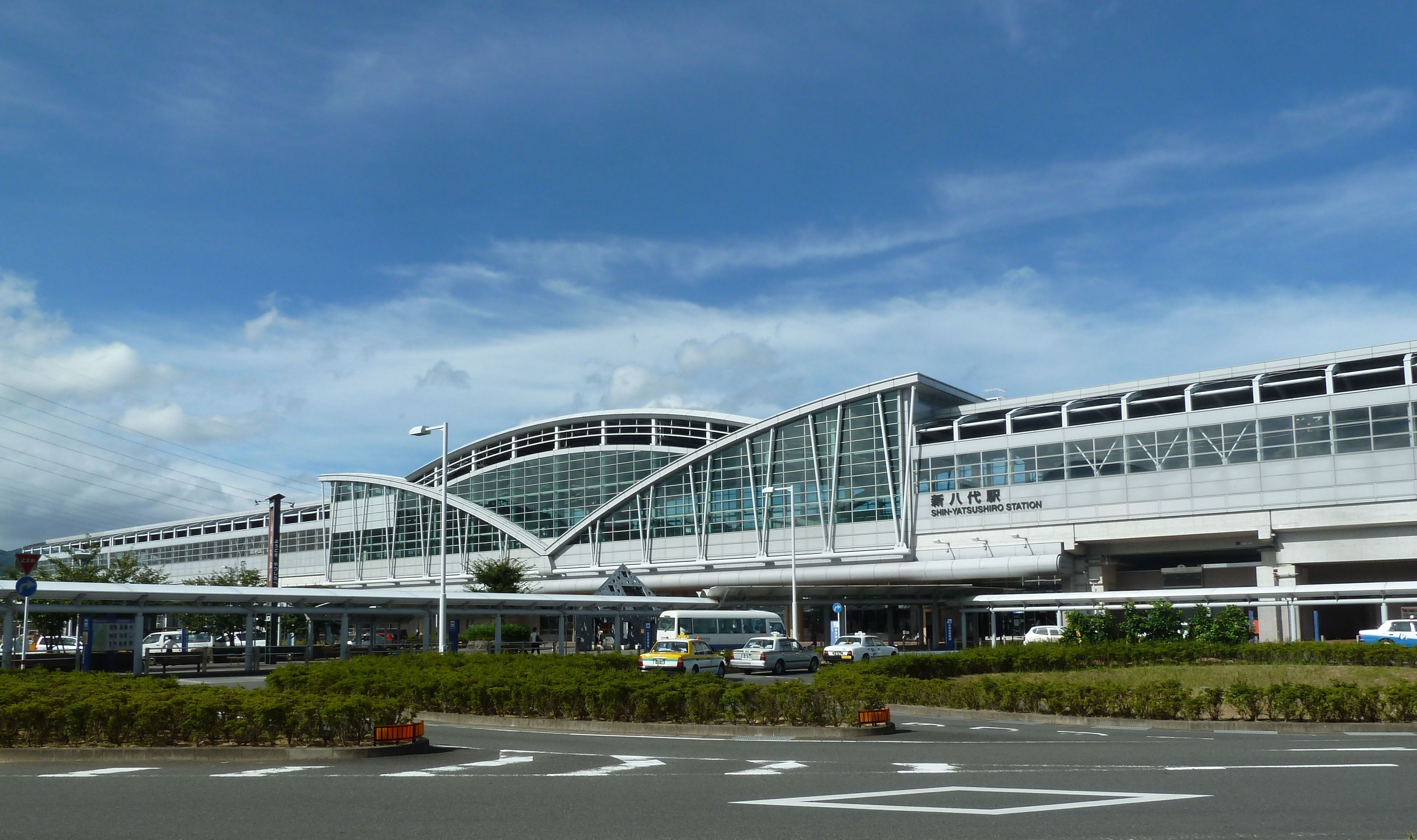 新八代駅駅舎